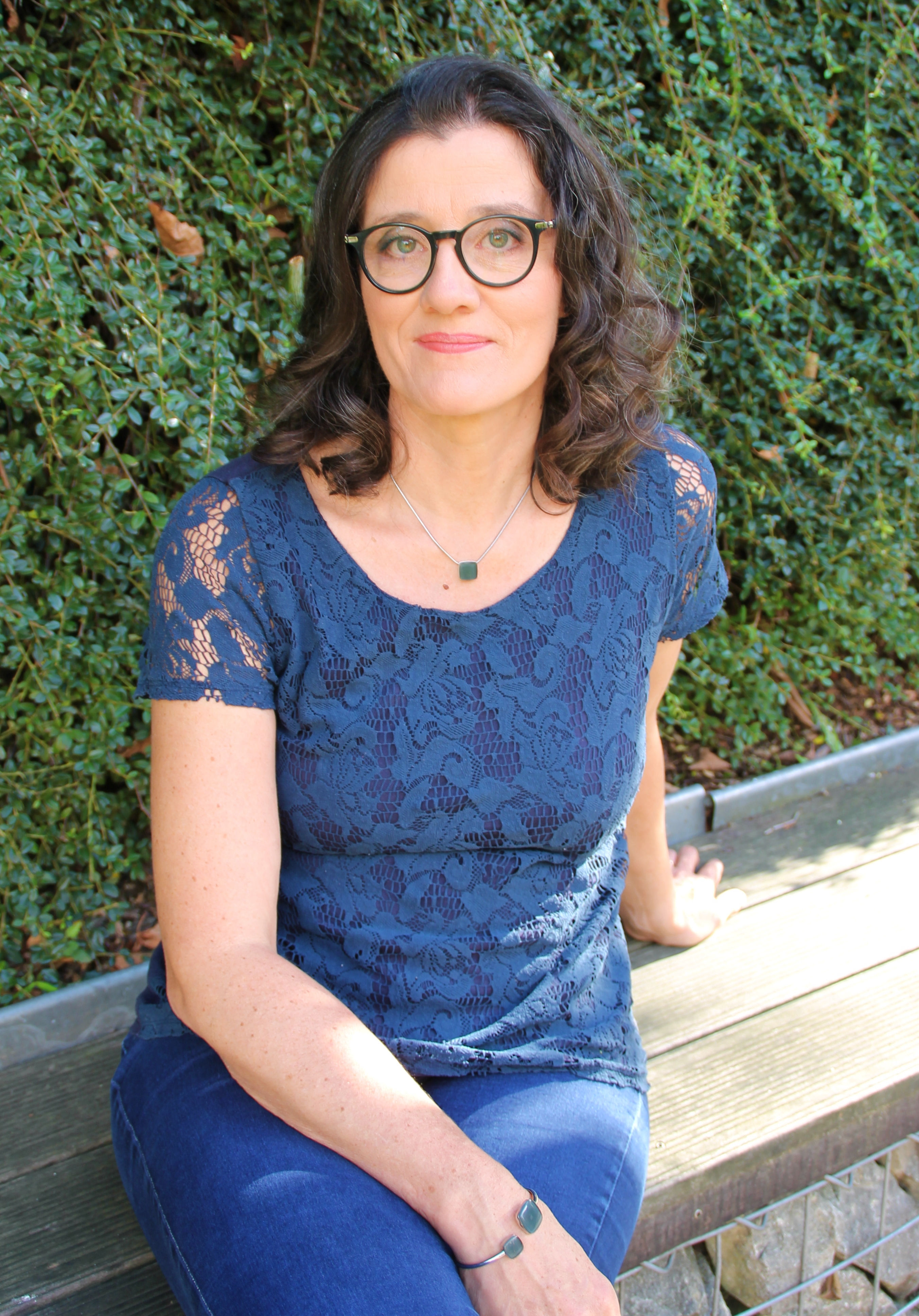 Sabine Ahrens-Eipper im OPK-Vorstand